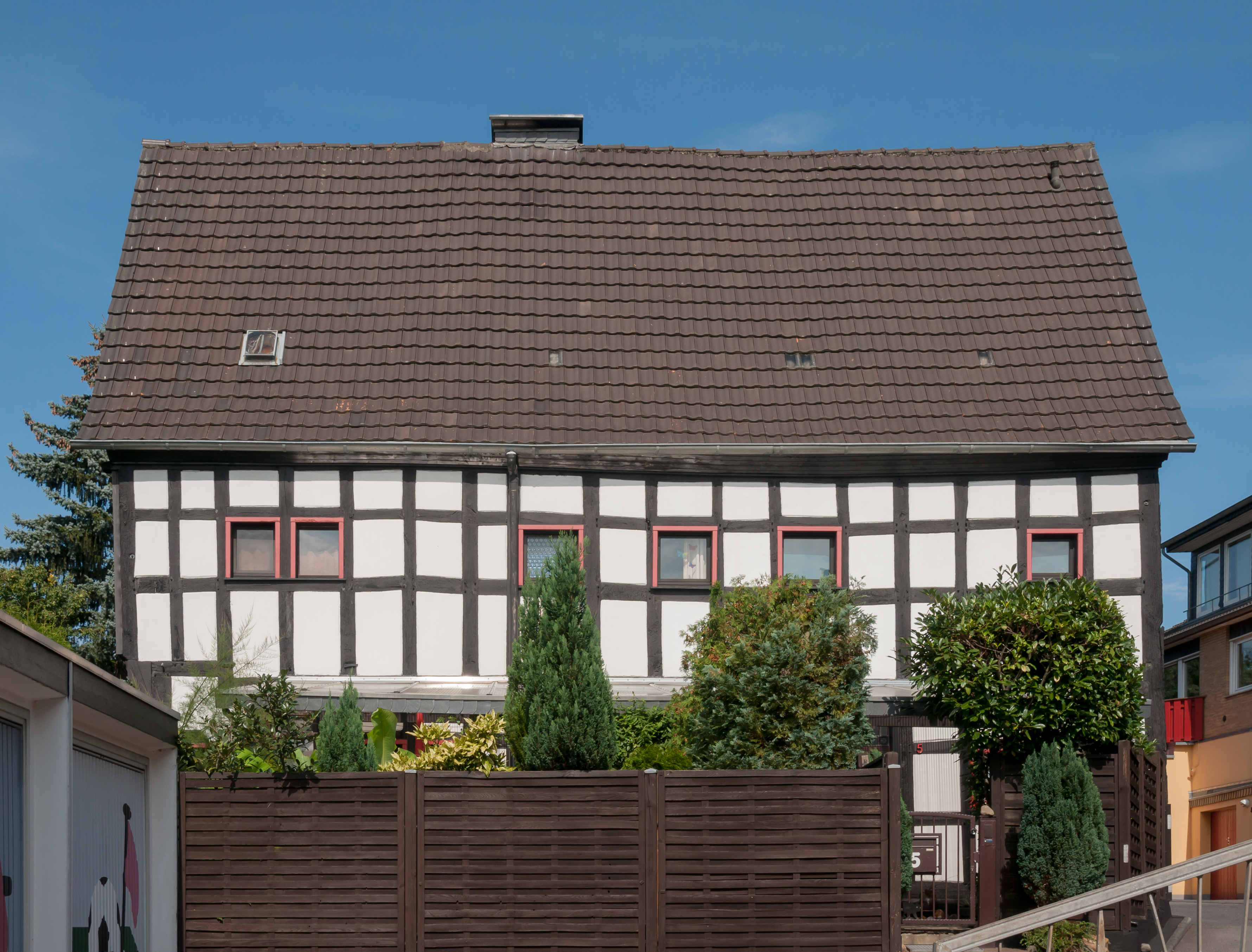 Rösrath, Denkmalnummer 47, Steeg 5 (Haus Steeg)